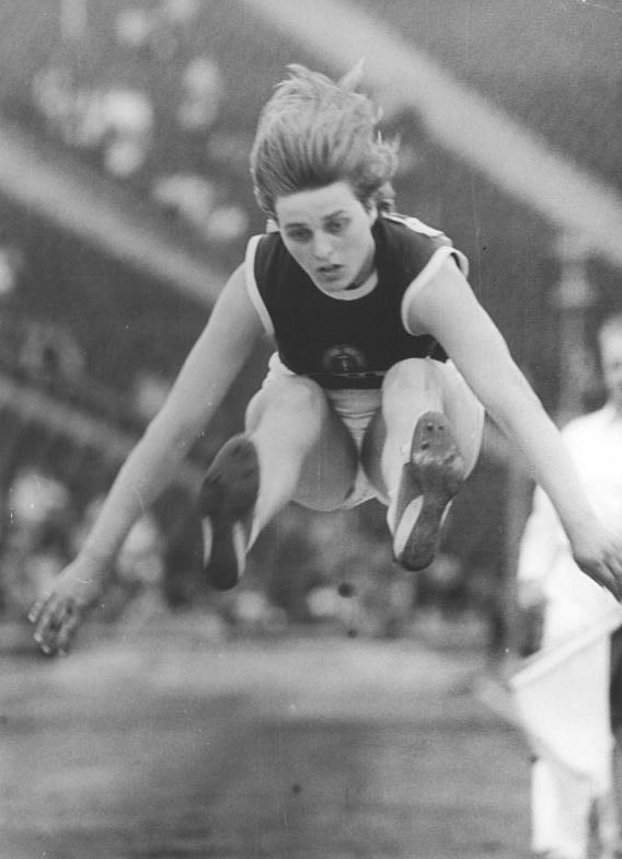 Hildrun Claus Zentralbild Dressel Sd-Noa 24.7.1960 Deutsche Leichtathletikmeisterschaften vom 22.-24.7.1960 im Leipziger Zentralstadion. UBz: Den Meistertitel im Weitsprung holte sich Hildrun Claus in der neuen deutschen Rekordweite von 6,30 Meter.